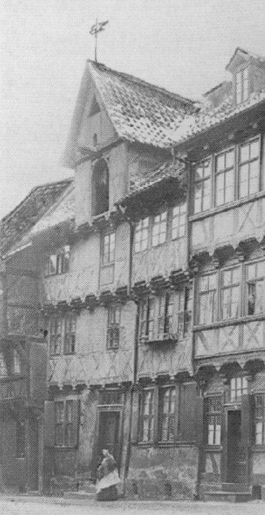 Marktkirchhof 6, Quedlinburg um 1900, Ausschnitt aus einer Fotografie